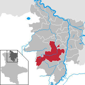 Stendal im Landkreis Stendal, Sachsen-Anhalt